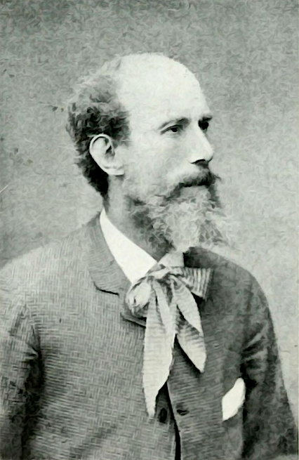 Stefano Bruzzi